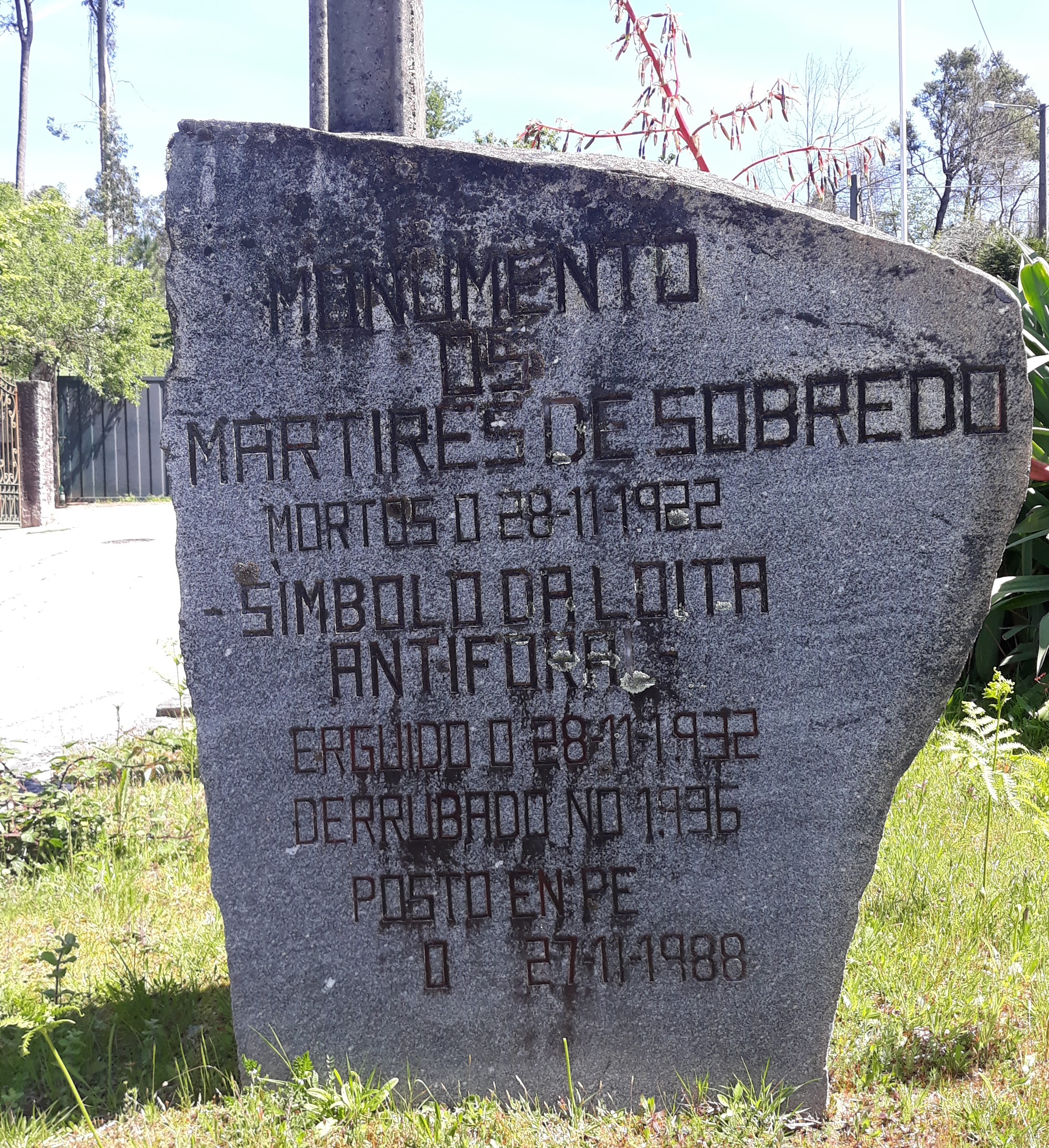 Inscripción de Camilo Nogueira, os mártires de Sobredo